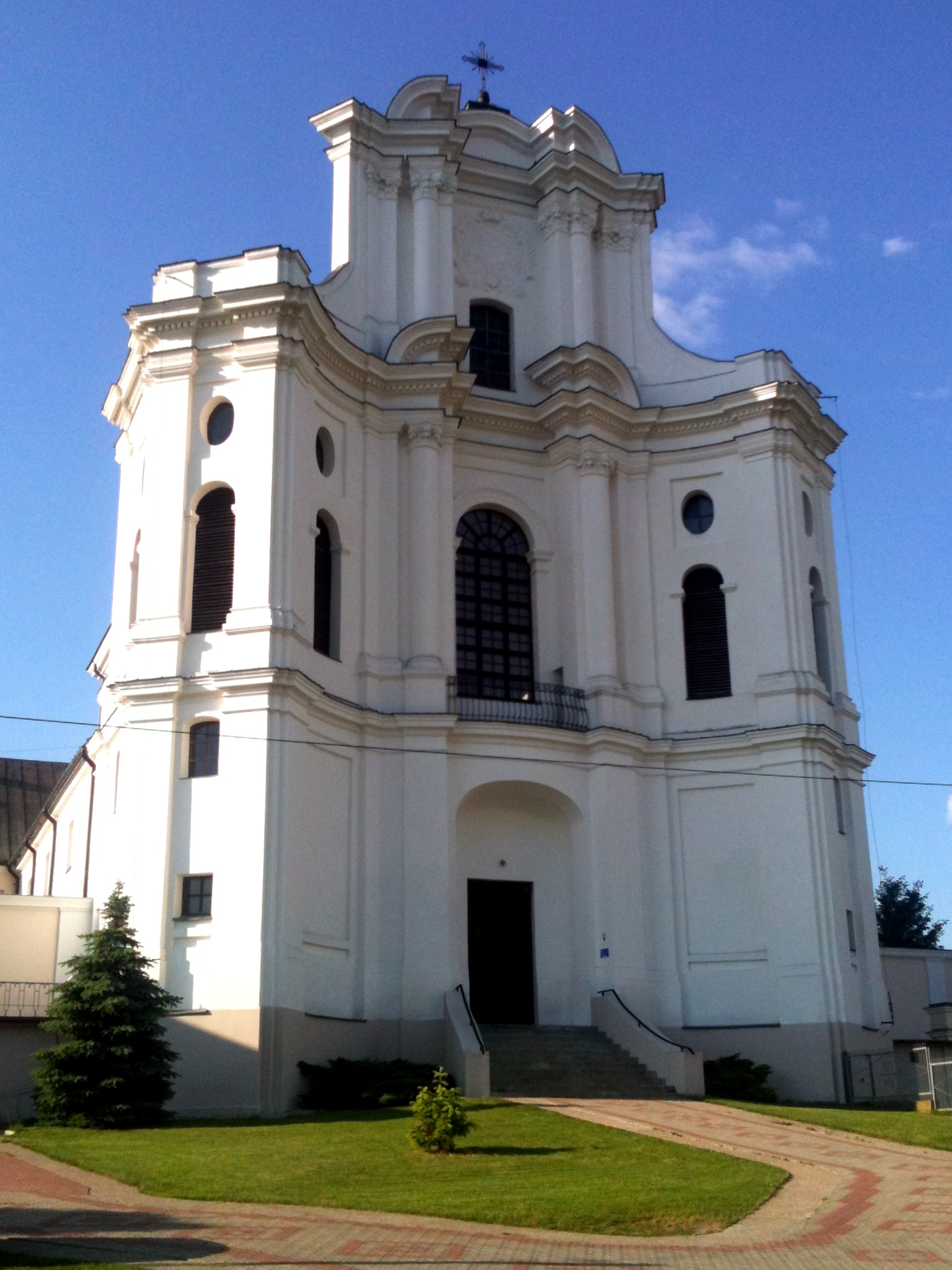 Kościół benedyktynek w Drohiczynie